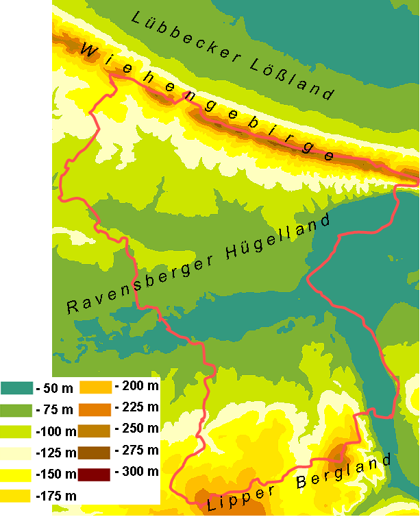 Bad Oeynhausen Topographie